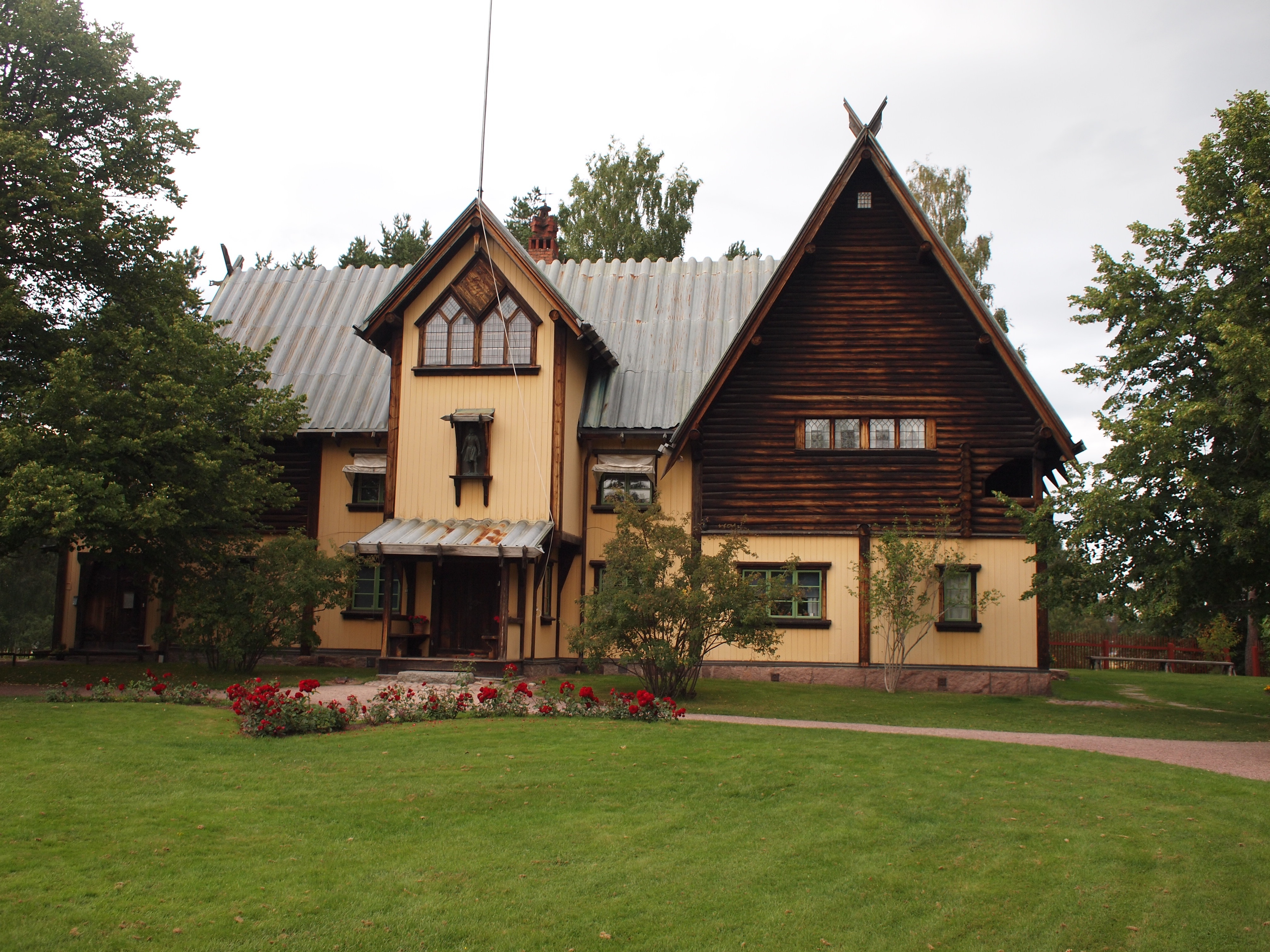 see title